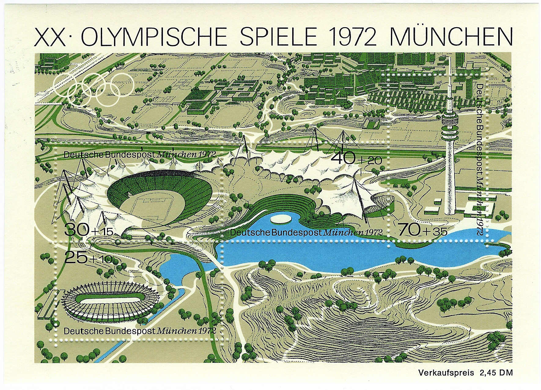 Bildbeschreibung: Das Bild zeigt den am 5.7.1972 erschienen Briefmarkenblock (Michel Block 7 / Michel Nr. 723-726) Fotograf/Zeichner: unbekannt Datum: eingescannt am 23.5.2006 durch RedPiranha Sonstiges